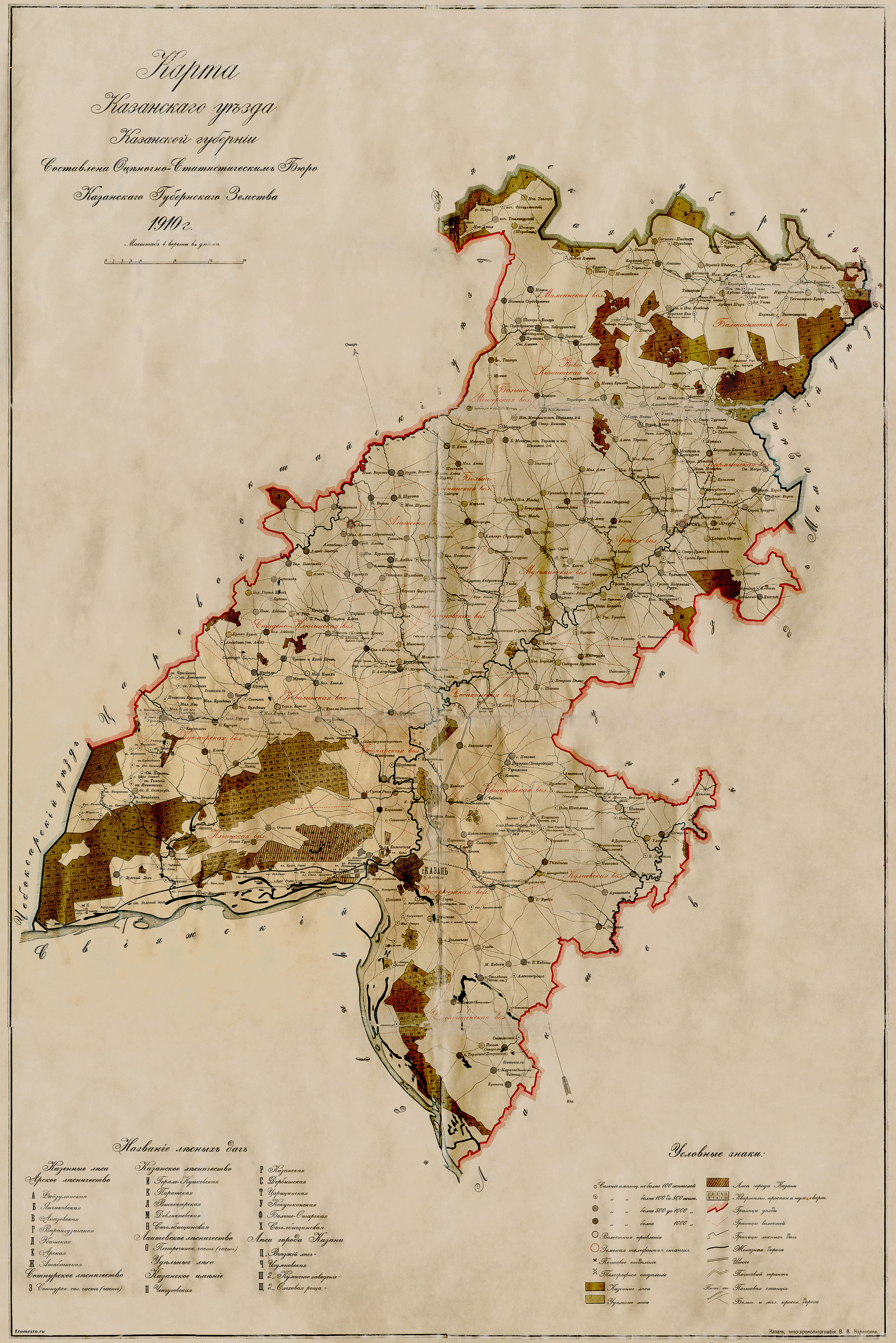 Карта Казанского уезда Казанской губернии. Составлена оценочно-статистическим бюро Казанского губернского земства в 1910 году. Масштаб 4 версты в дюйме. Казань: Типо-хромолитография В.В. Вараксина.